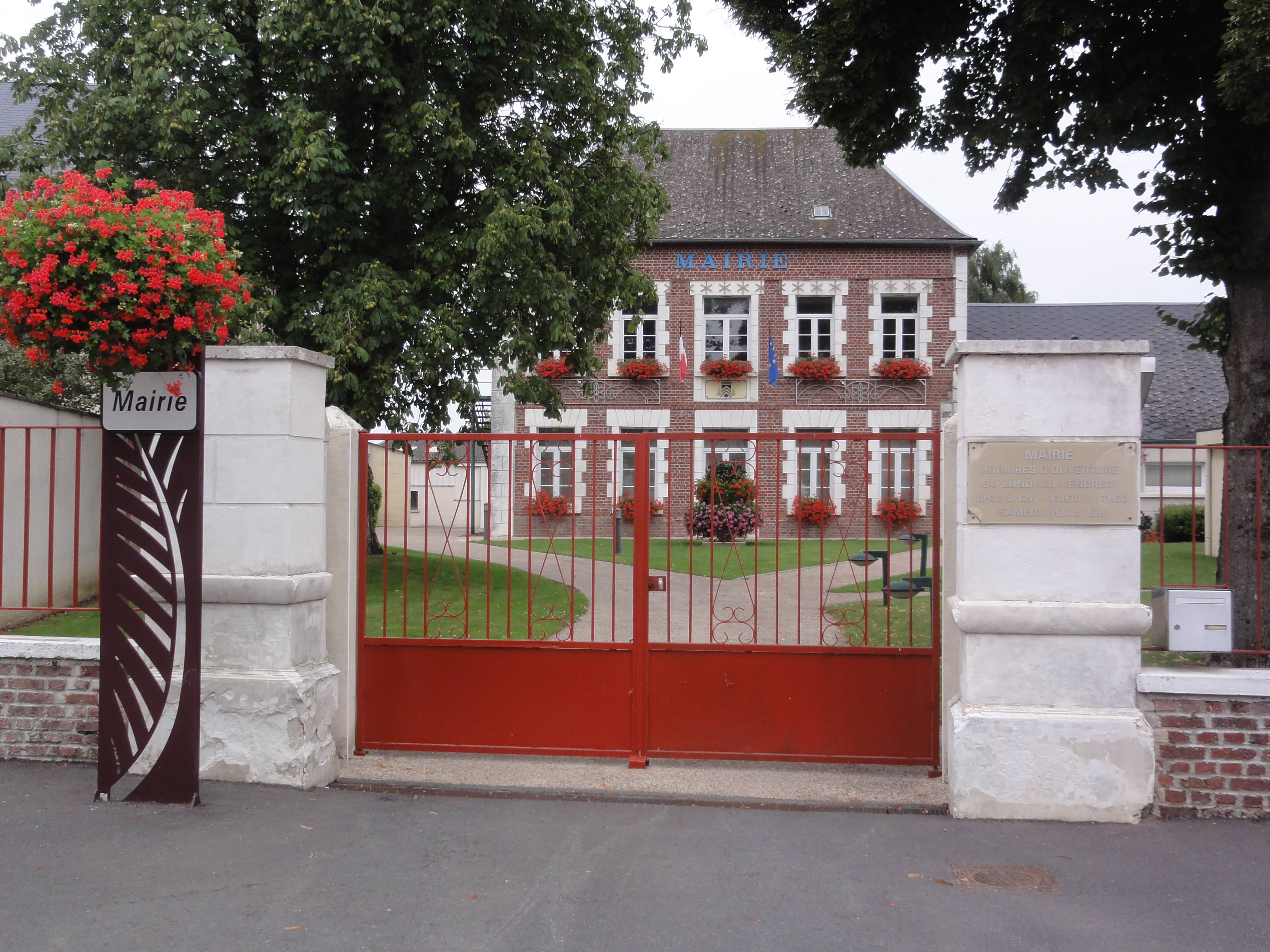 Seboncourt (Aisne) mairie